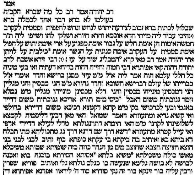 דברי אגדה של האמורא רב יהודה